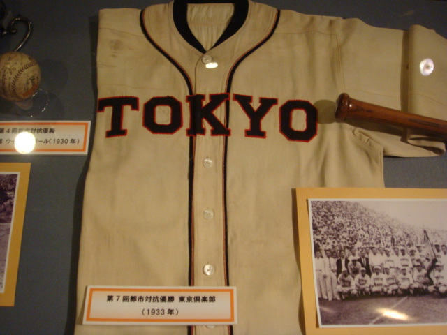 ［［第85回都市対抗野球大会］］開催中の［［野球殿堂博物館］］特別展で撮影（撮影許諾あり）